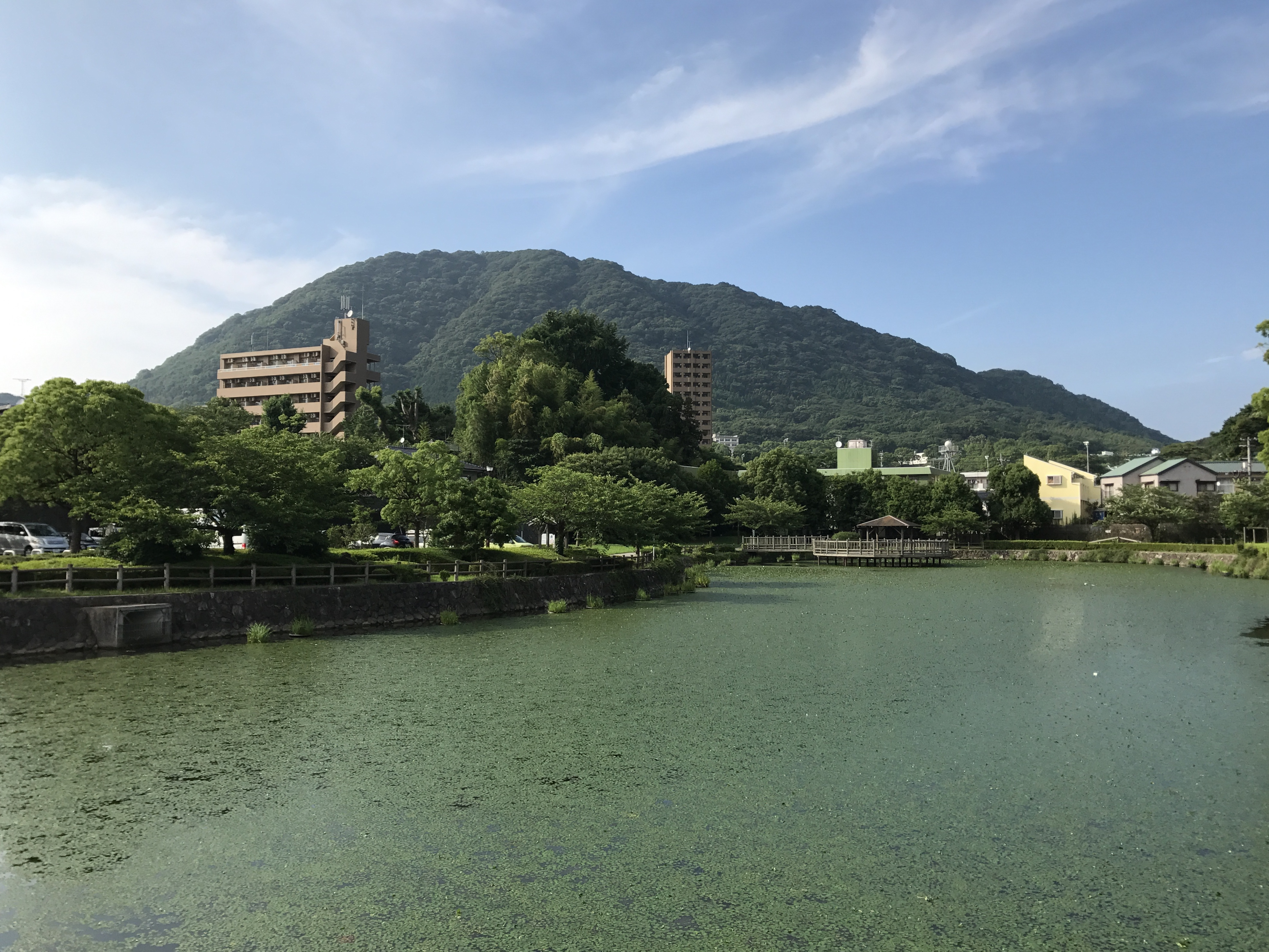 熊越池公園と城山